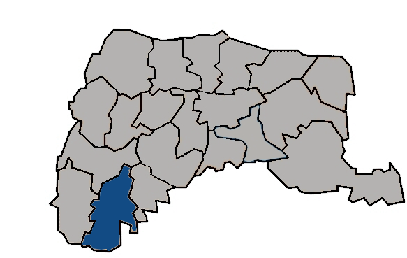 台灣省雲林縣水林鄉 KaurJmeb於2005年1月28日為編輯zh:水林鄉所繪製